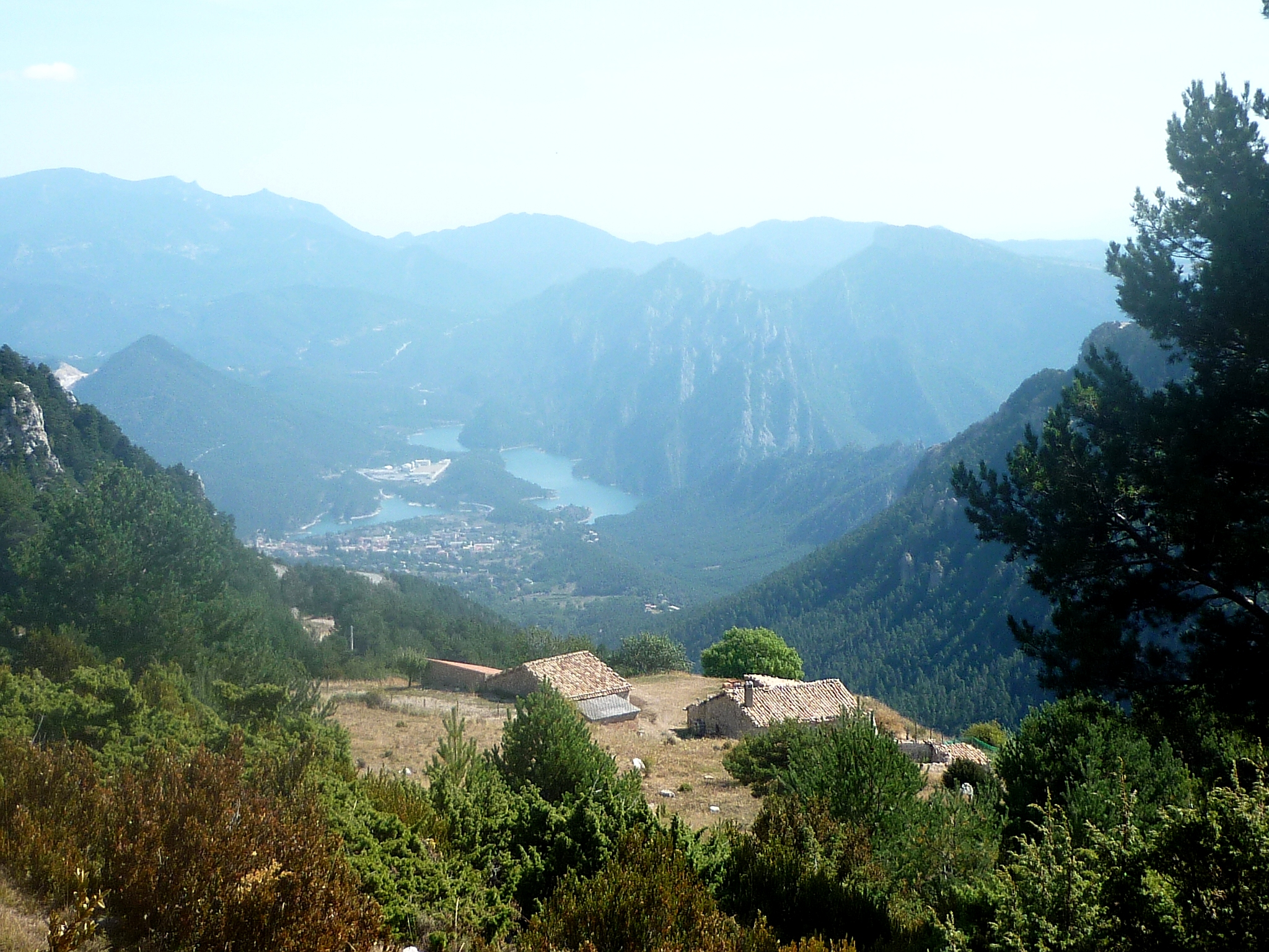 l'Emplaçament de la masia és envejable.